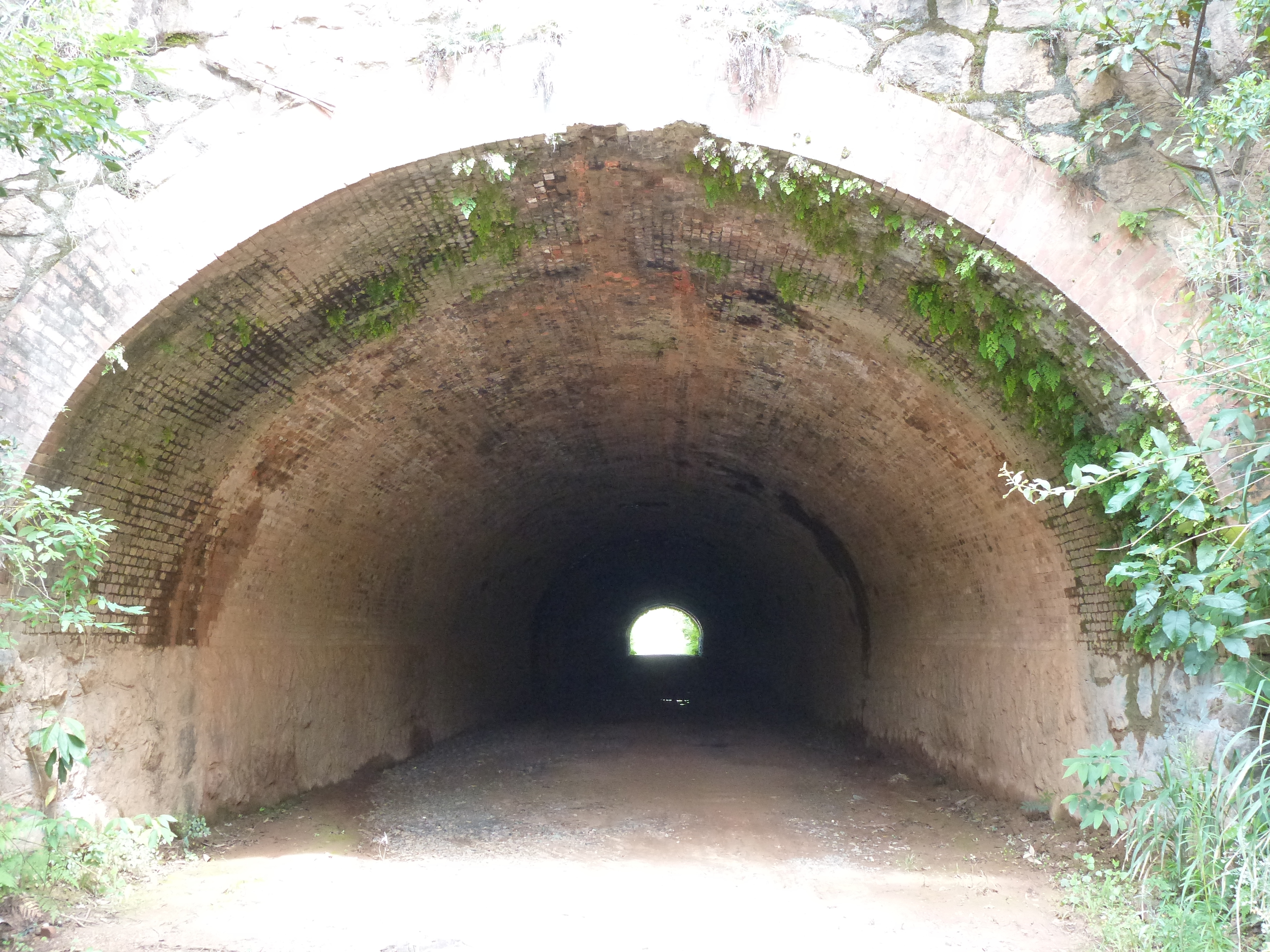 Túnel existente no antigo traçado Itu-Mairinque da Estrada de Ferro Sorocabana próximo à Variante Boa Vista-Guaianã km 161 em Mairinque.